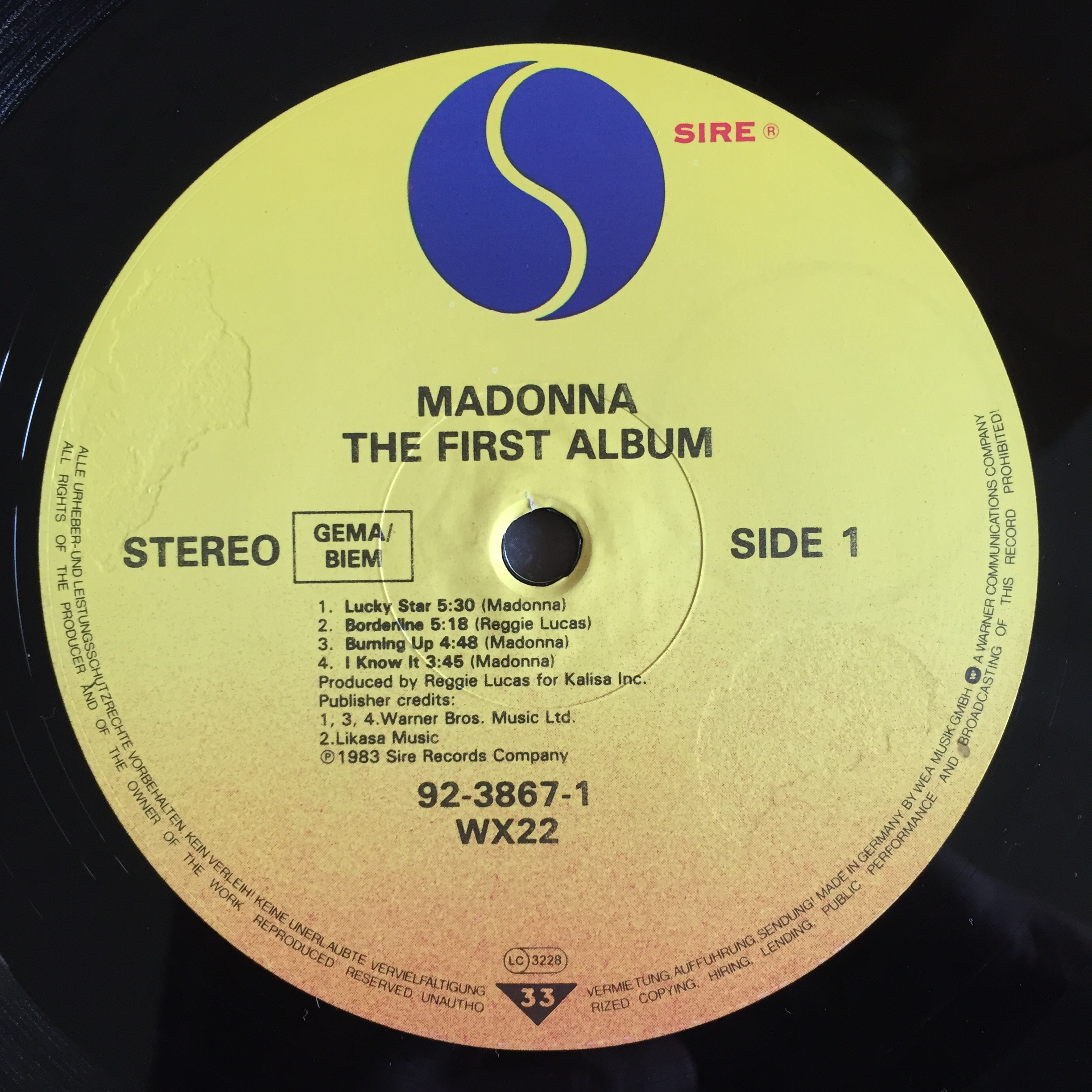 Label der LP "The First Album"